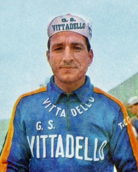 CAMPIONI dello SPORT 1966/67-Figurina n.191- TACCONE - CICLISMO